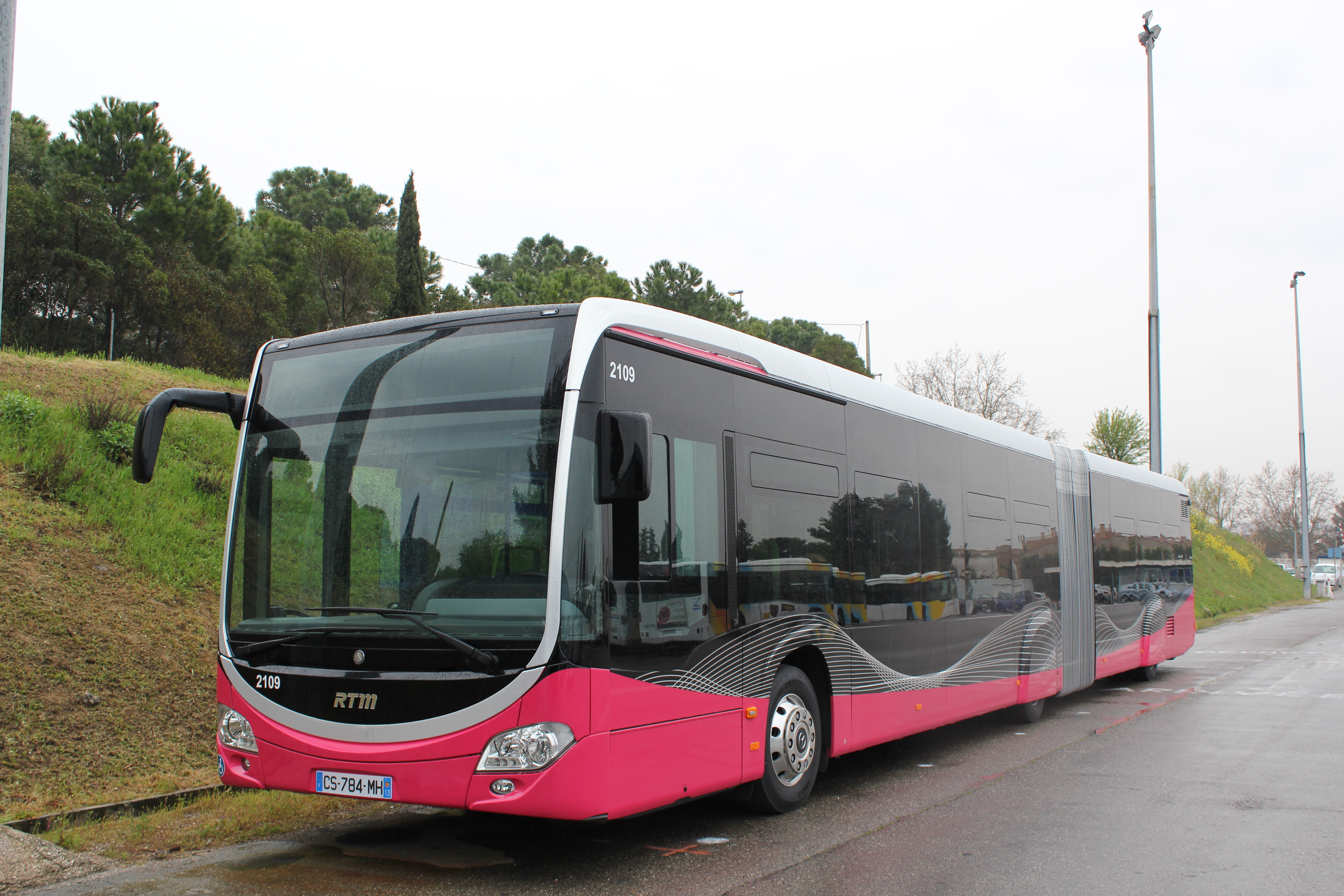 Autobus articulé Mercedes-Benz O530 Citaro G C2 de la Régie des Transports Marseillais, nommé "Très Grand Bus"